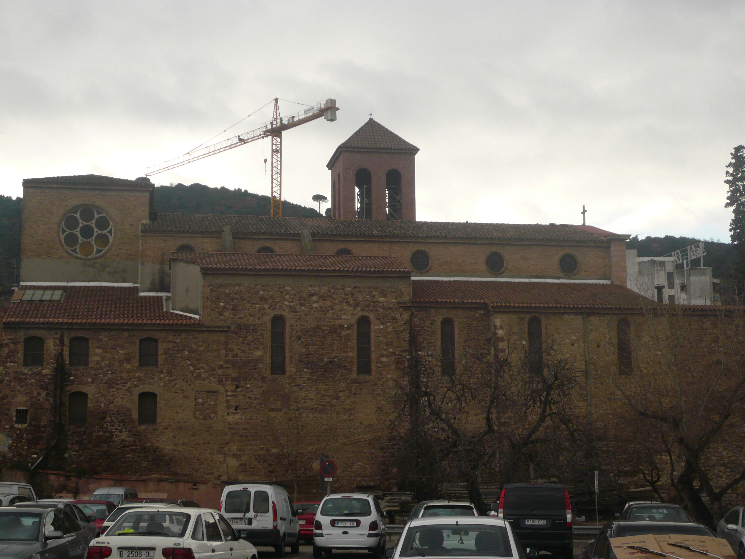 Església parroquial de Santa Maria (Martorell) Object location41° 28′ 28.51″ N, 1° 55′ 40.7″ E